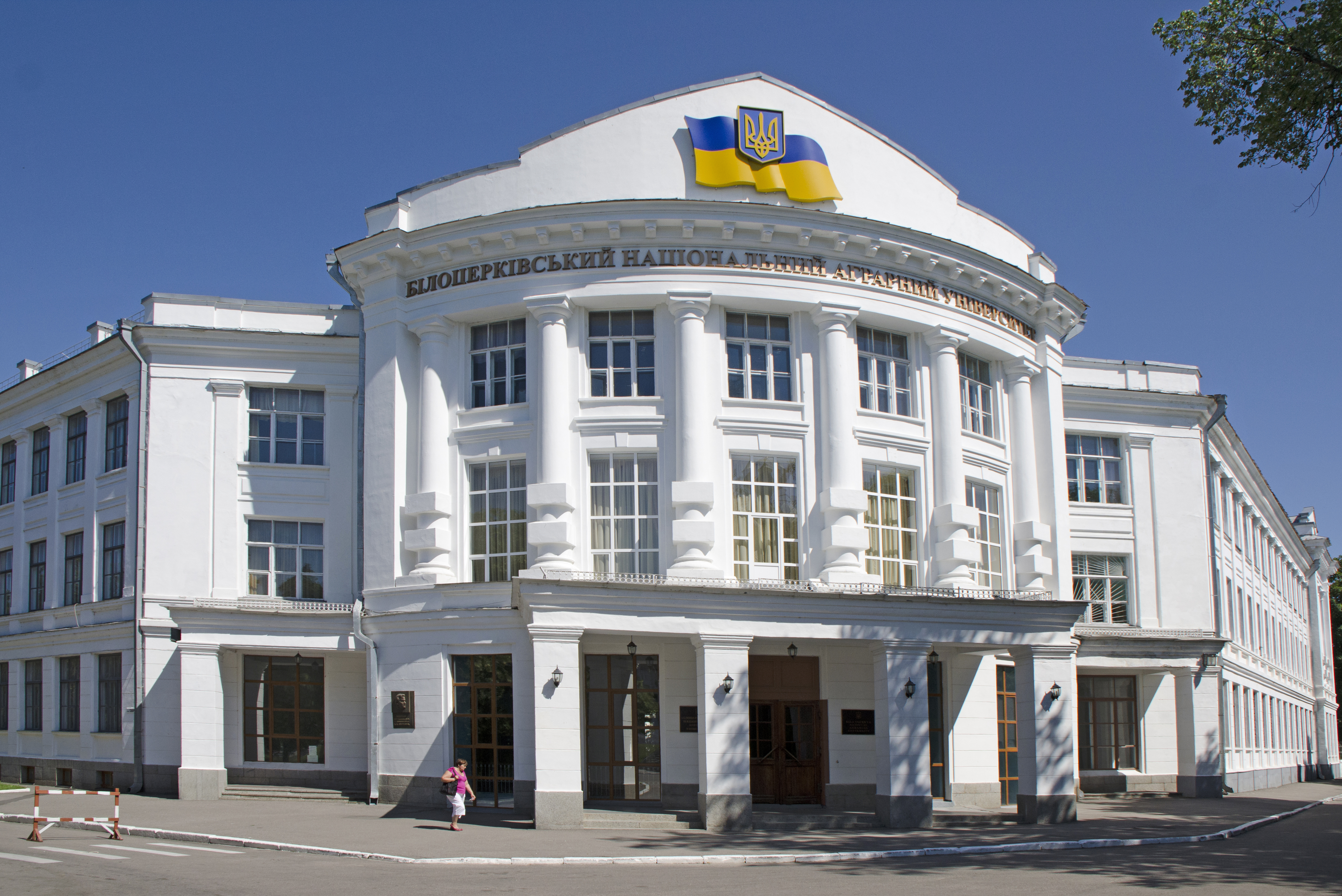 Головна будівля Білоцерківського національного аграрного університету, Біла Церква, пл. Соборна 8/1